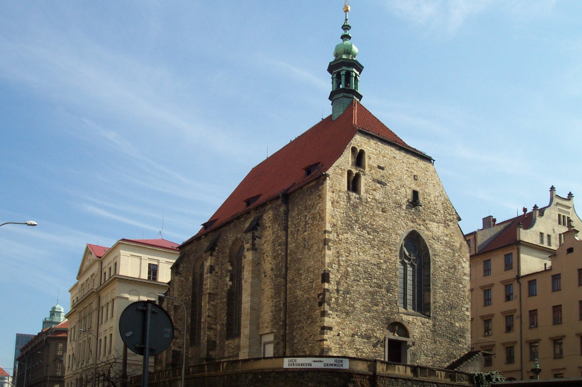 Church at Praha - Nové Město - Kostel v Praze na Novém městě